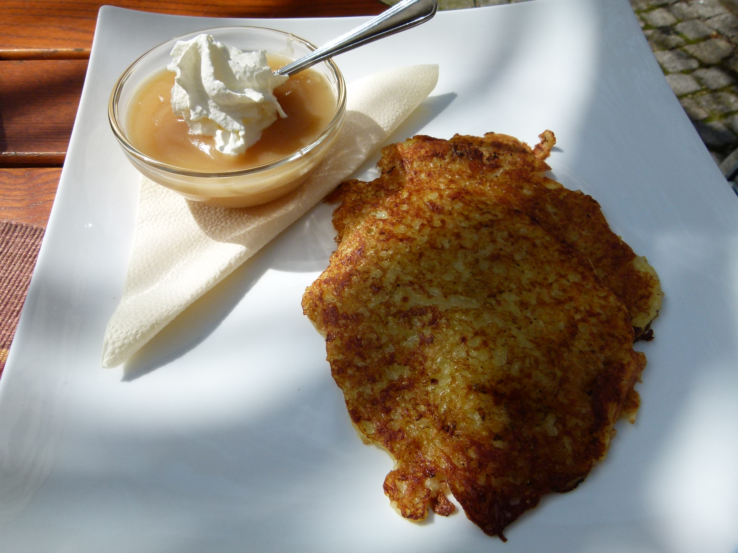 Bambes mit Apfelmus in Plauen (Vogtland/Sachsen) (Gastwirtschaft Matsch)